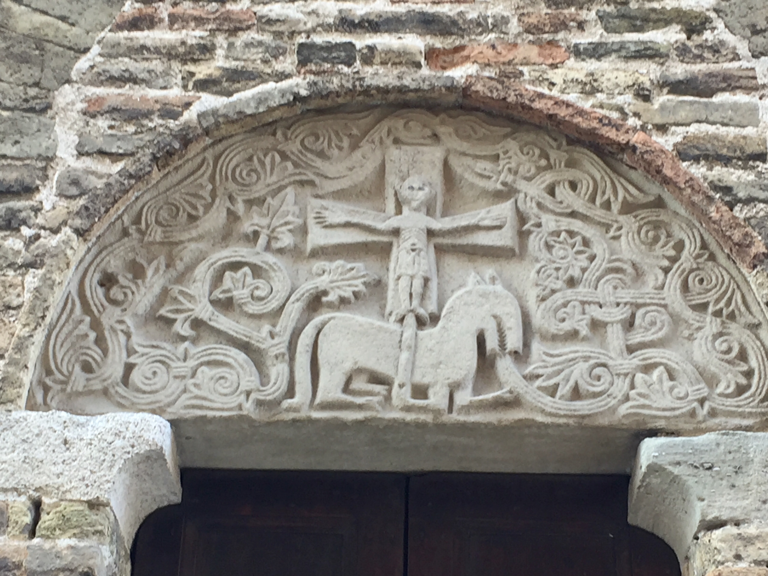 Porte de la Tour Gerosolimitana (XIII°Siècle)